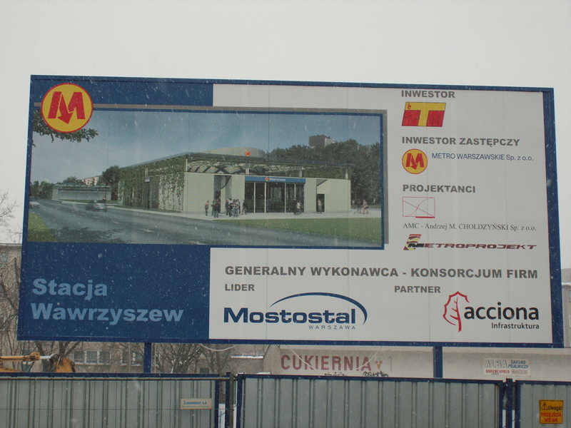 Bilbord informacyjny o budowanej stacji Wawrzyszew/Information about building Wawrzyszew station